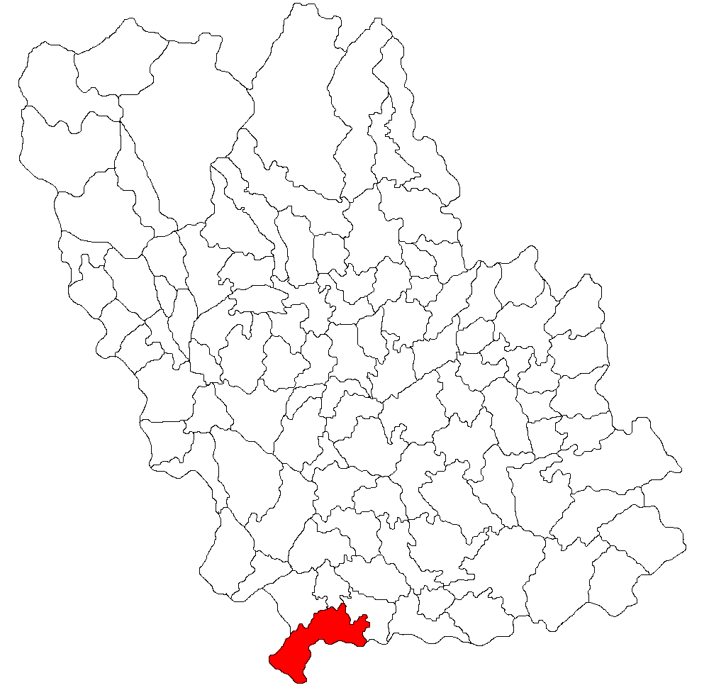 Categorie:Hărţi ale judeţului Prahova